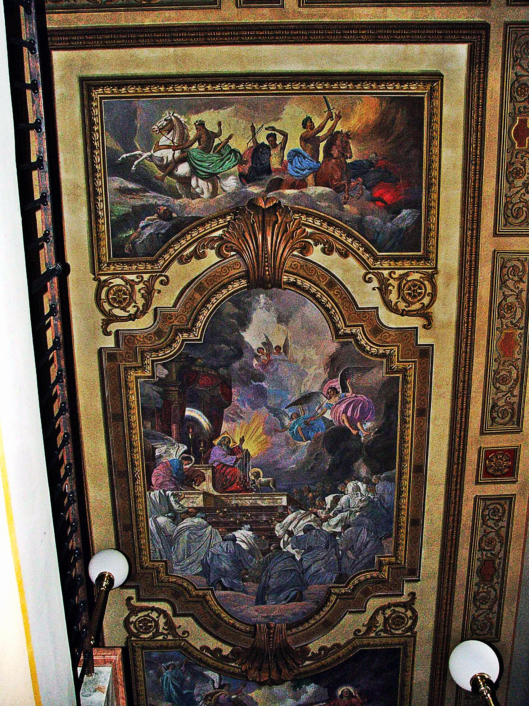 A Főszékesegyházi Könyvtár folyosójának plafonja